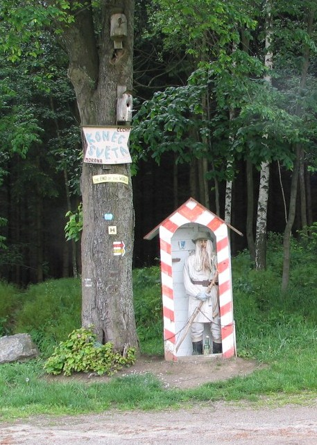 Konec světa je místo na Vysočině u obce Hamry nad Sázavou, pod kopcem Peperek, na Hamerském vycházkovém okruhu, kde je hraniční kámen historických zemí Čech a Moravy, strážní budka a donedávna zde byla i závora.